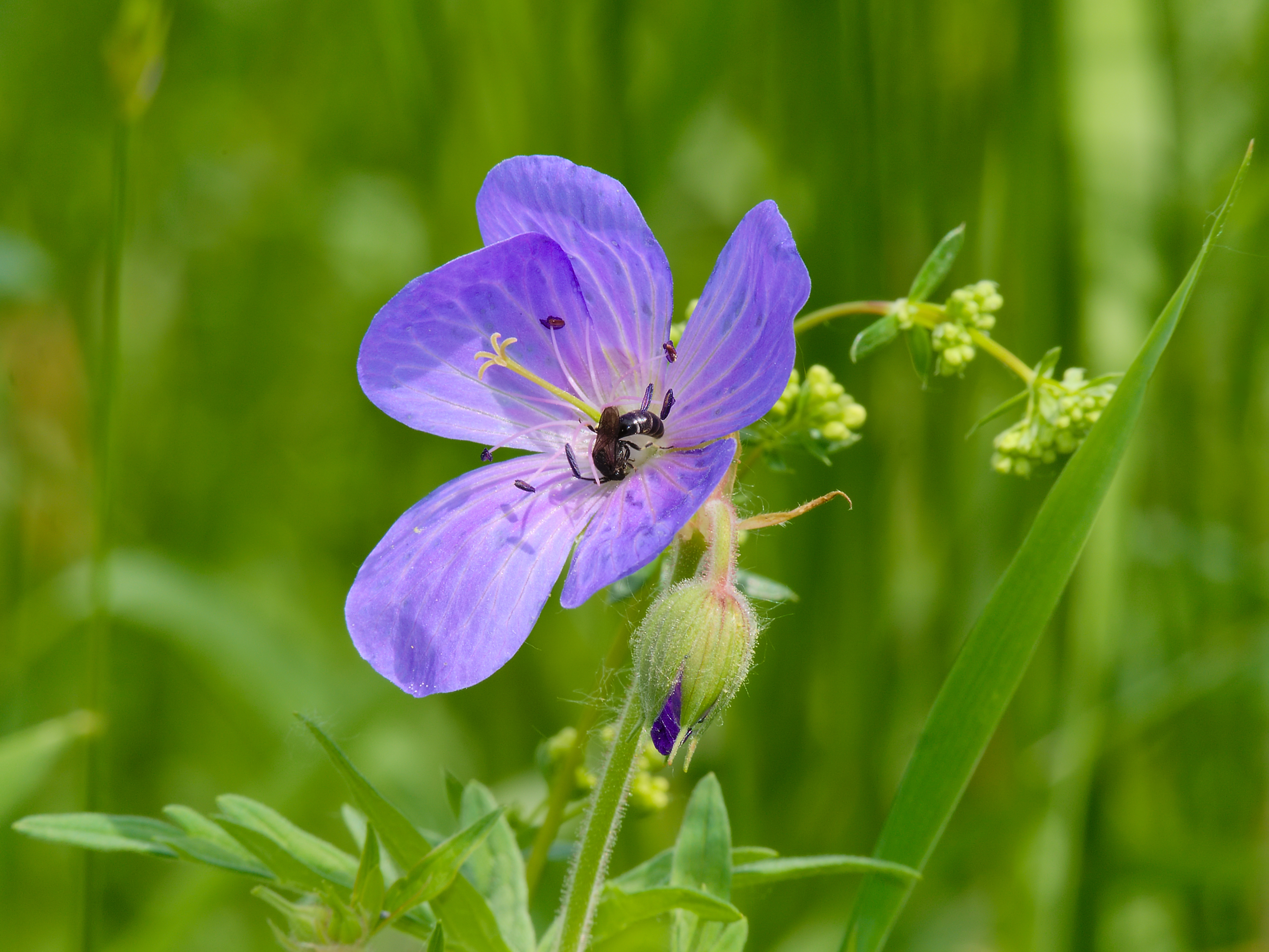 Wiesen-Storchschnabel - Geranium pratense. Aufgenommen in Mannheim, Kirschgartshäuser Schläge am Bruchgraben, Baden-Württemberg, Deutschland.